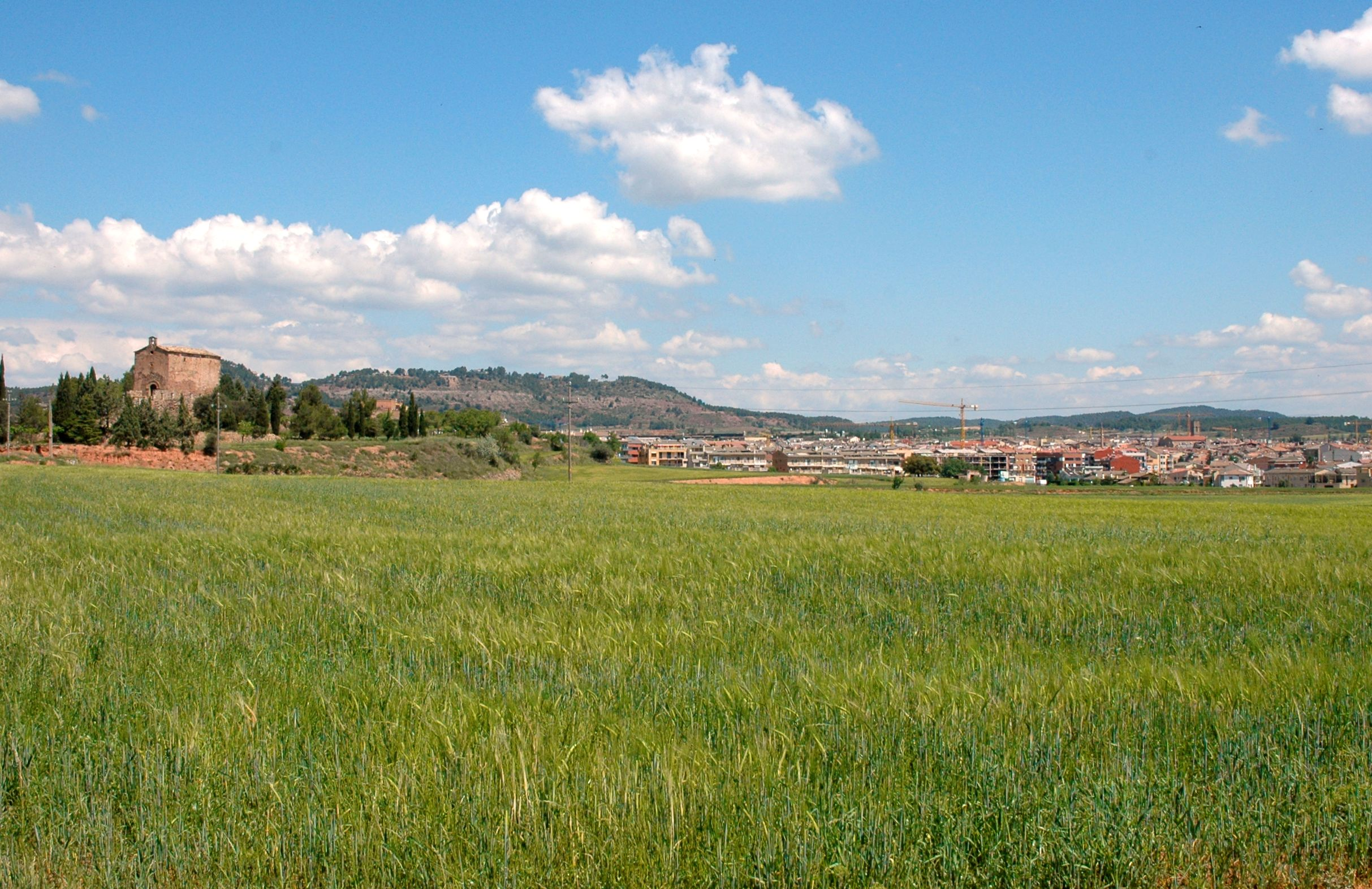 Santpedor des de Sant Francesc